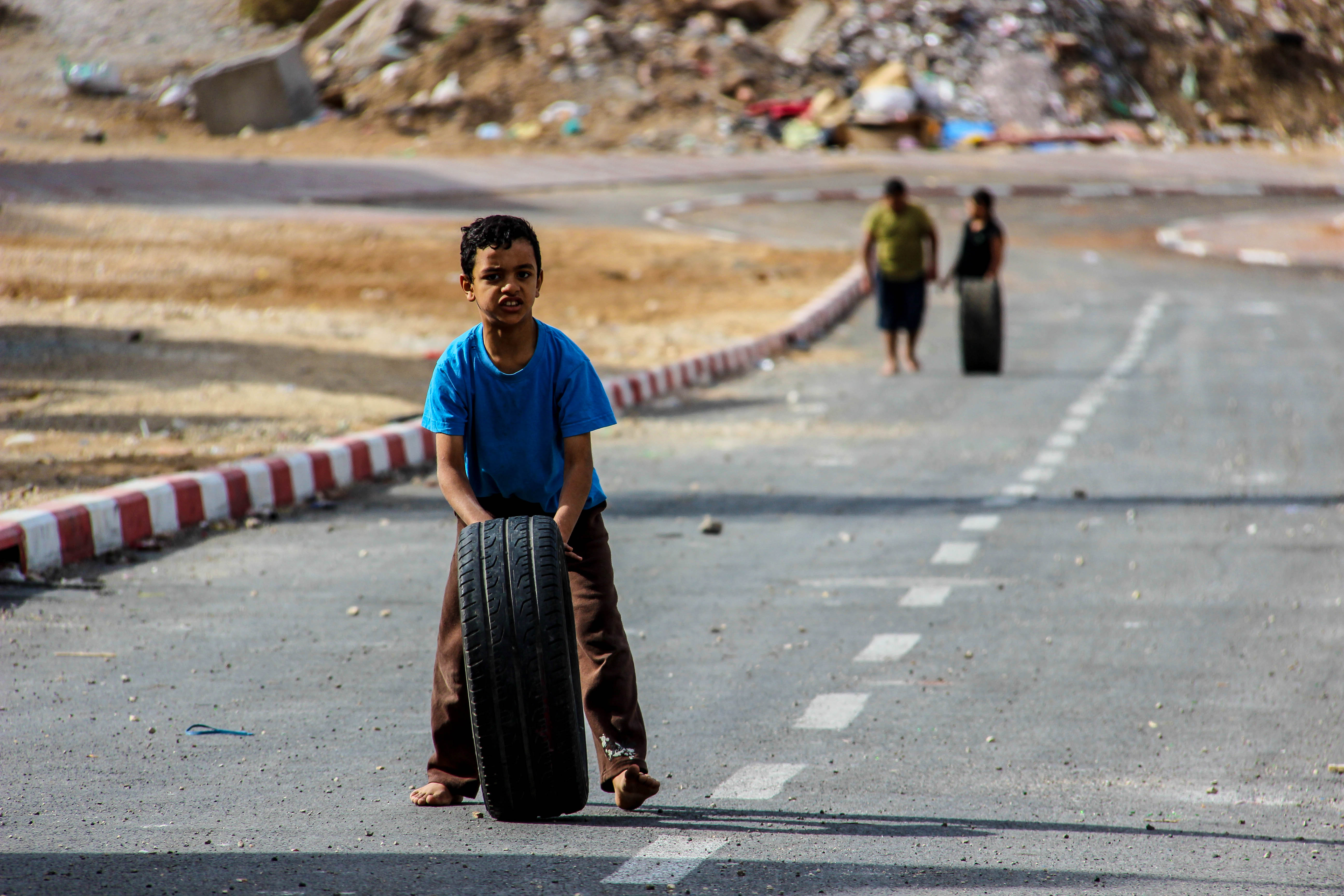 الطُّفولة في قريةِ جسر الزرقاء. تصوير: مُعتز توفيق إغباريّة